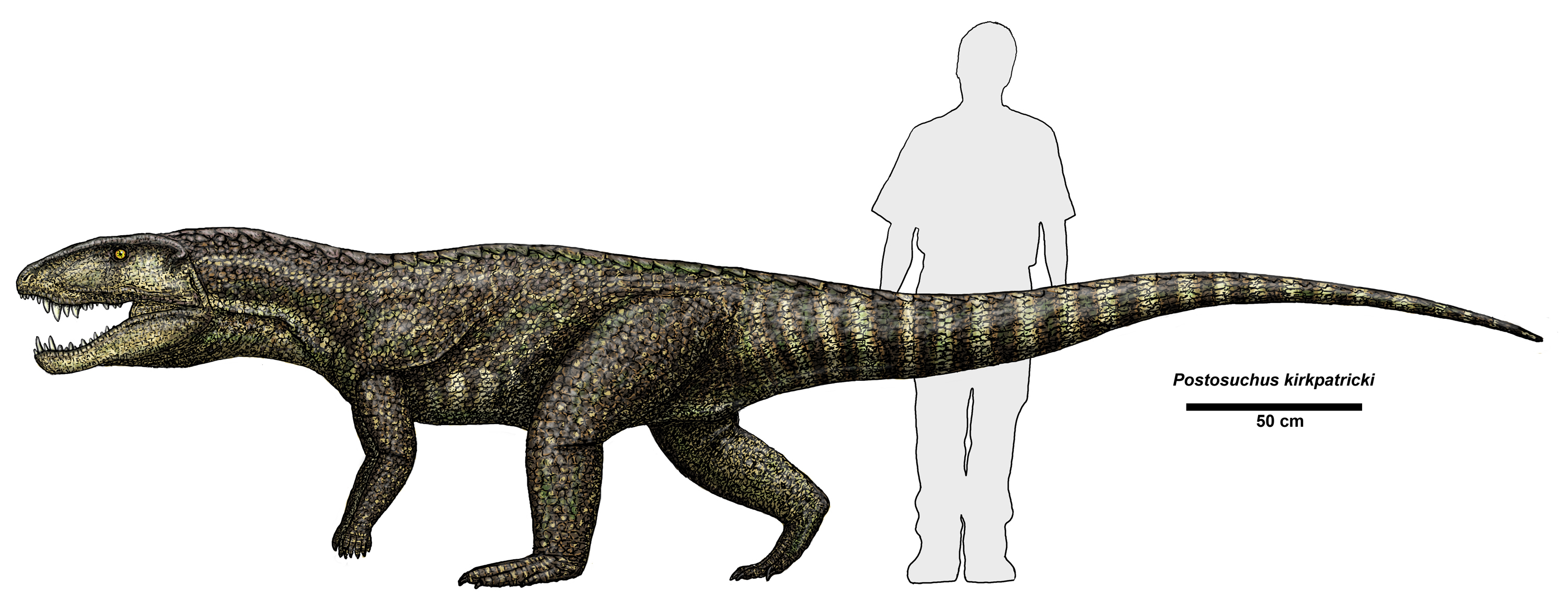 Credit Dr. Jeff Martz/NPS